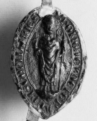 Pok nb. Amadé győri püspök pecsétje 1256-ból